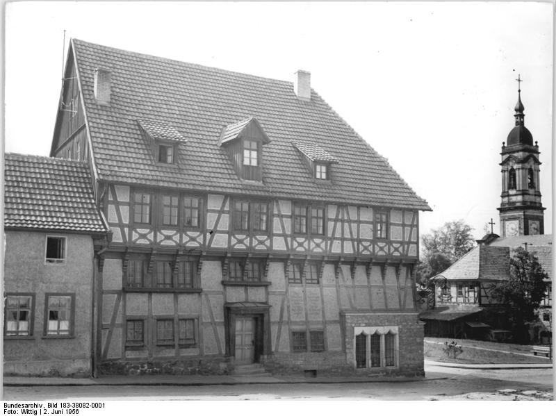 Eisenach, Lutherhaus Zentralbild Erfurt Wittig 2.6.56 Das Eisenacher Lutherhaus wurde renoviert Das Lutherhaus in Eisenach wurde während des Krieges schwer beschädigt und konnte nun Anfang Mai nach einer gründlichen Renovierung der Öffentlichkeit übergeben werden. Während des Eisenacher Aufenthalts des Knaben Martin Luther (1448-1501) fand dieser als Georgenschüler und Kurrendesänger in diesem Hause die Fürsorge der Frau Ursula Cotta und ihrer Familie. Die wieder errichtete Gedankstätte birgt jetzt auch alte Thüringer Bibeldrucke und Missionsbibeln. Einen Ehrenplatz nimmt Luthers Bibelübersetzung mit seinen handschriftlichen Eintragungen ein, während der Hauptanziehungspunkt die Luther-Stube ist, die unter Anleitung des Direktors der Wartburgstiftung Dr. Siegfried Asche, museal neu gestaltet wurde. Im oberen Geschoß des Hauses fand eine Auswahl von Ausstellungsstücken des evangelischen Pfarrhausarchives Aufnahme. UBz: Aussenansicht des Lutherhauses in Eisenach.